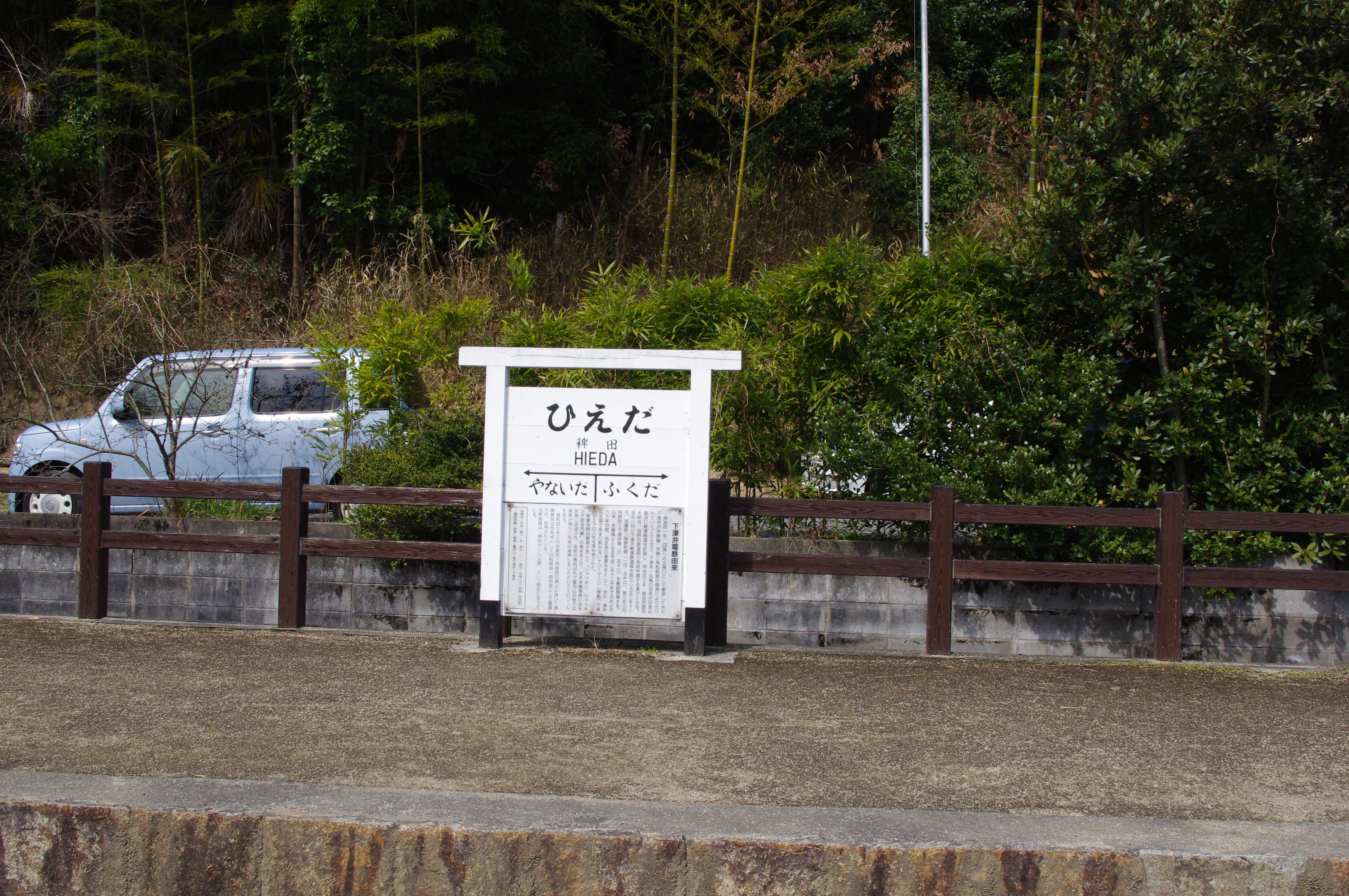 旧稗田駅跡（旧下津井電鉄）